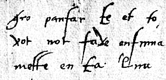 Détail. Texte placardé dans la cathédrale Saint-Pierre de Genève en 1547, rédigé en patois genevois et dénonçant la « tyrannie théocratique » instaurée par Jean Calvin. Original conservé aux Archives d'État de Genève.